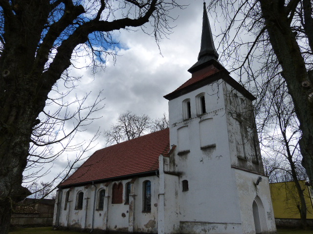 Kirche der Gottesmutter von Częstochowa (Tschenstochau) in Lipie (Rąbino)